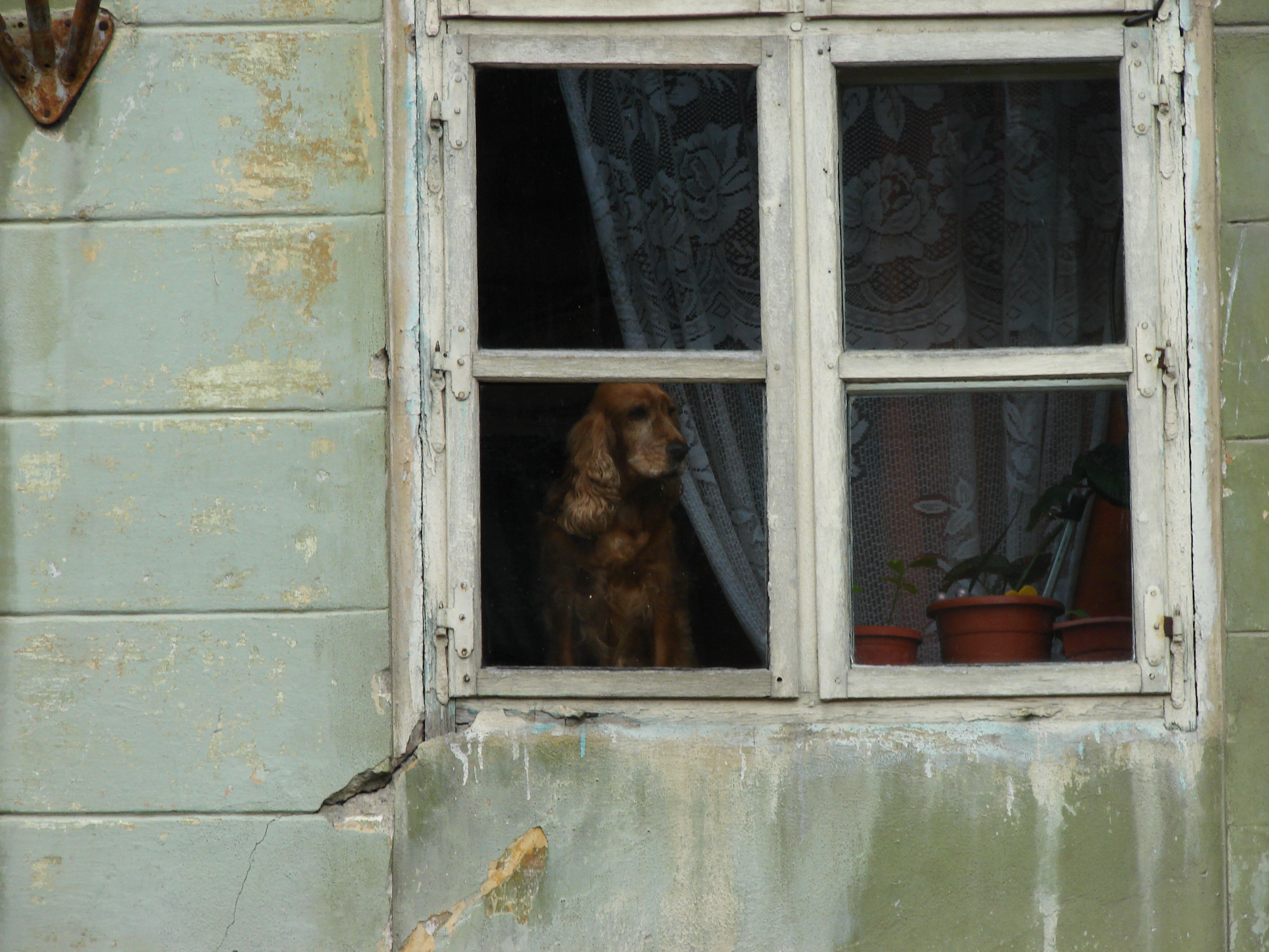 Orasul vechi are paznicii lui....